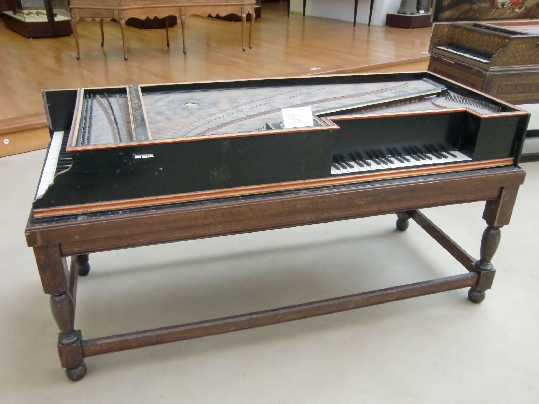 Combiné clavecin-virginal par Hans Ruckers (Anvers, 1594) - Berlin, Musikinstrument-Museum